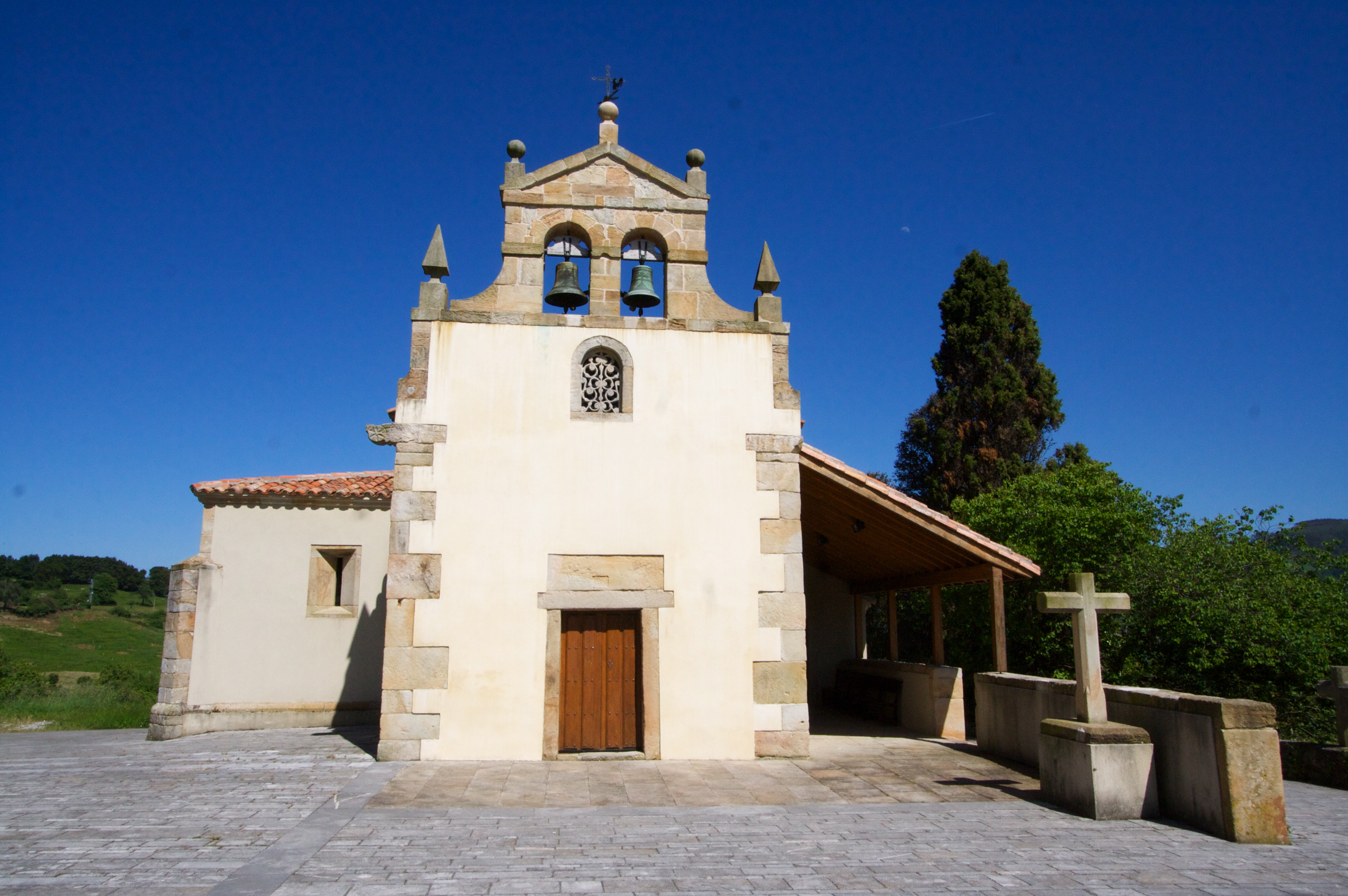 Iglesia de San Andrés de Bedriñana.